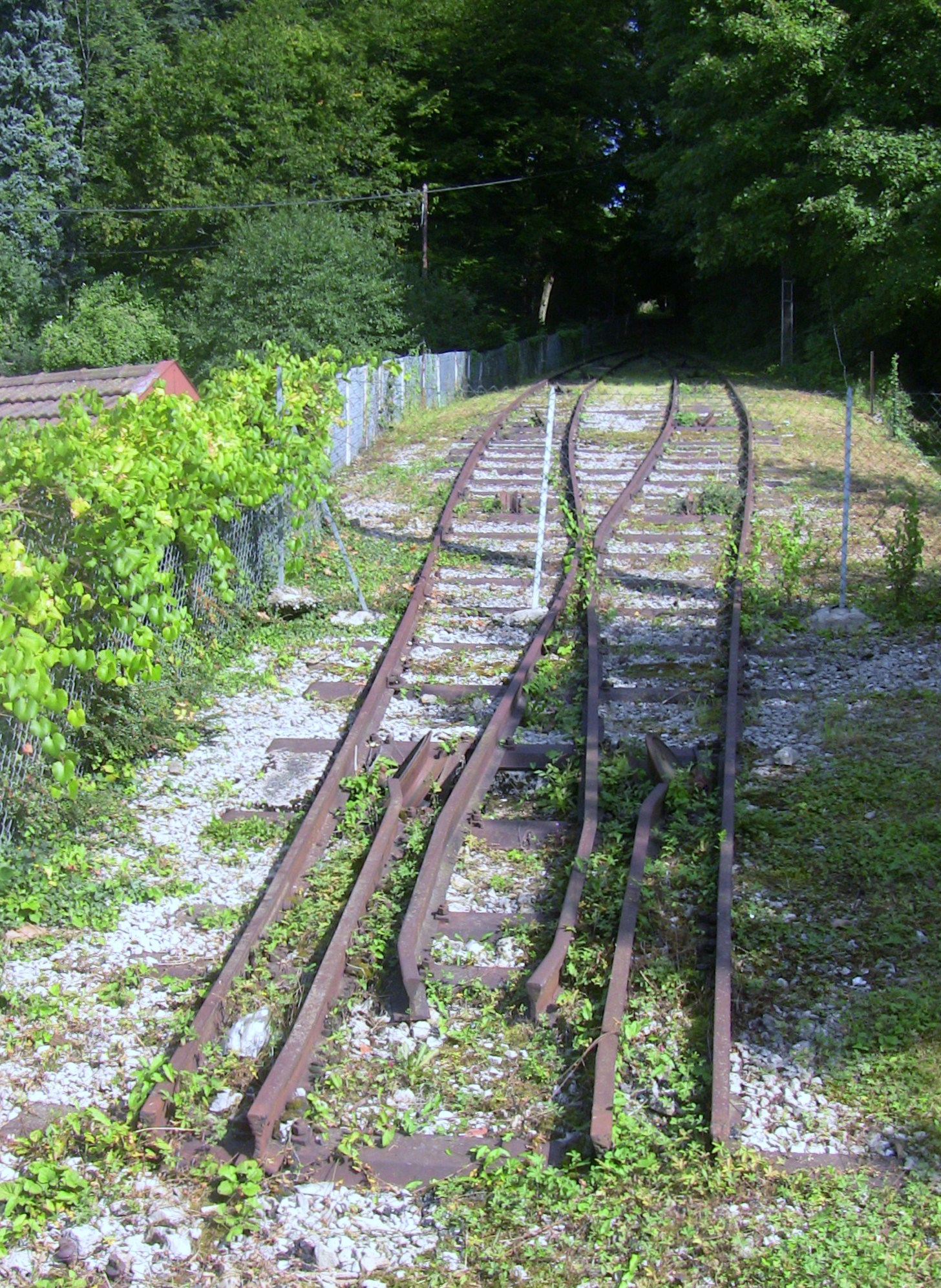 Le croisement "Abt" du funiculaire de Bregille à Besançon (Doubs, France).